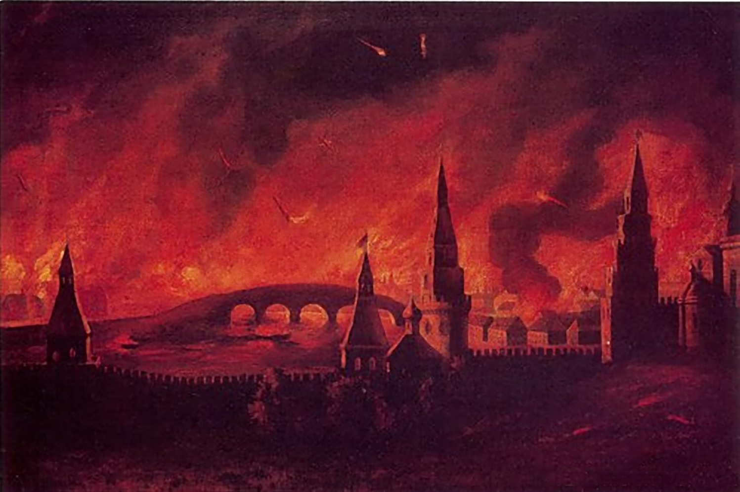 Moscow fire of 1812 / Пожар Москвы 1812 года